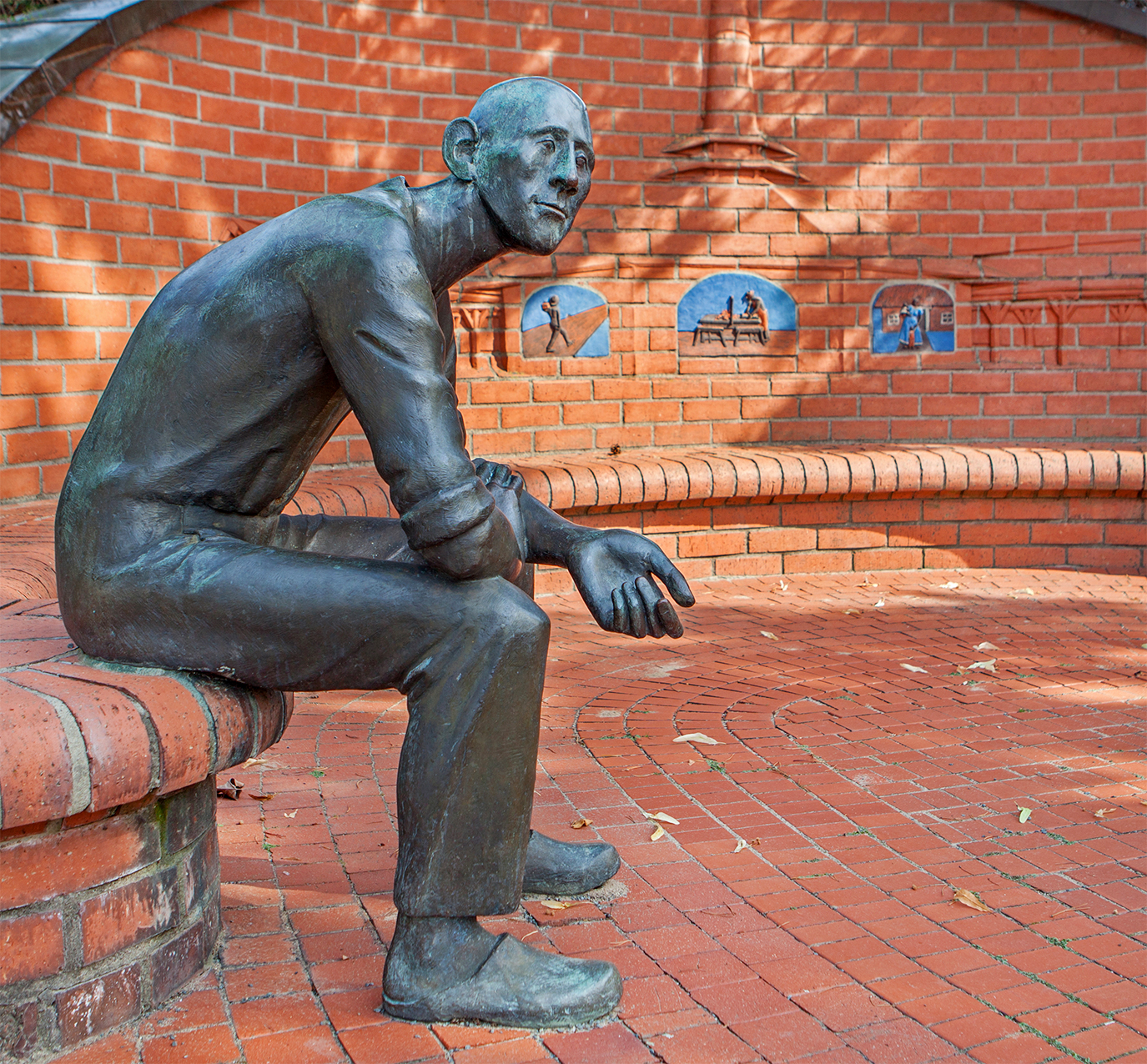 Zieglerdenkmal (von 1988) in Kalldorf, Gemeinde Kalletal, Kreis Lippe.